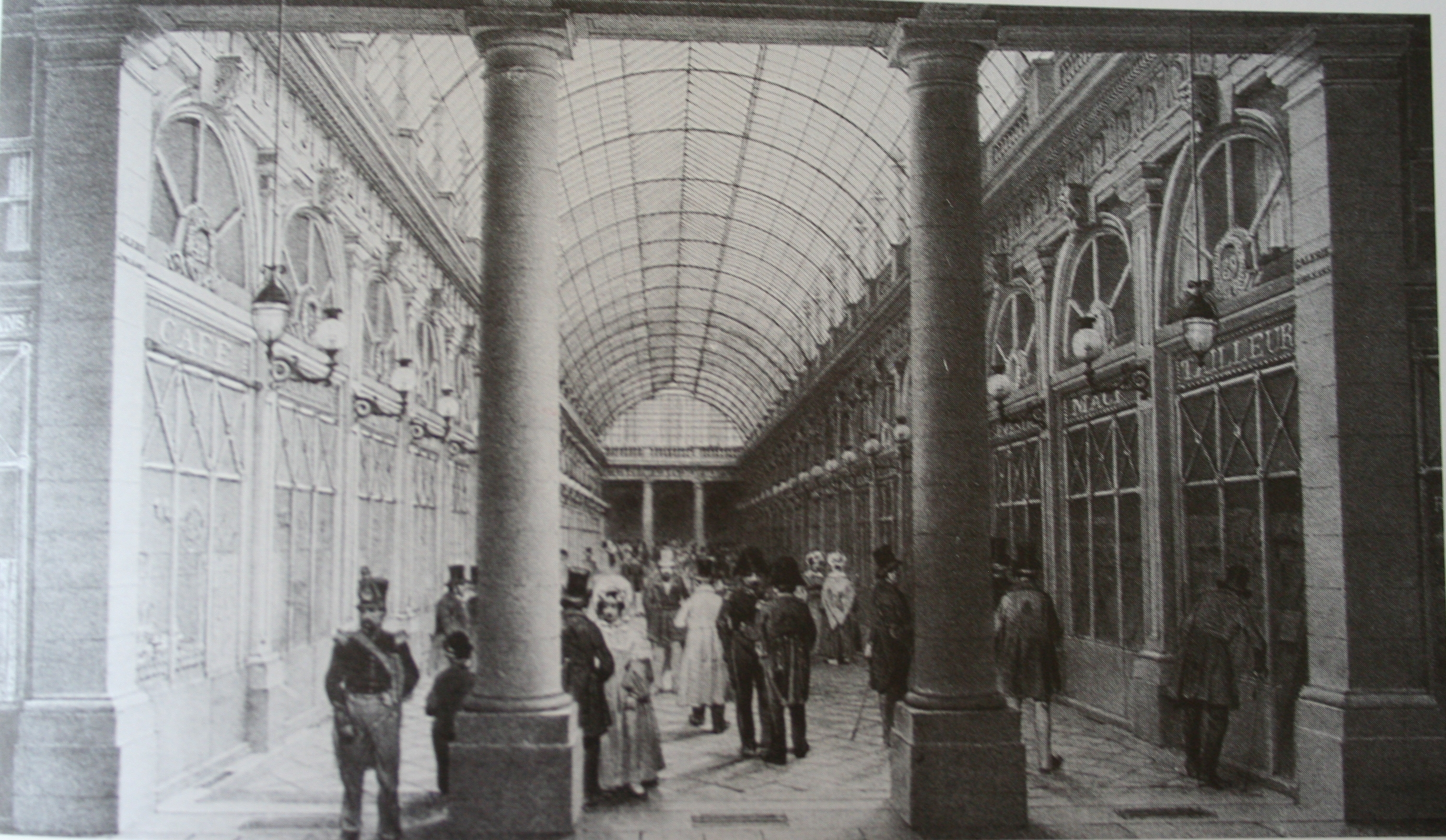 Vue intérieure de la galerie d'Orléans au Palais-Royal vers 1840.